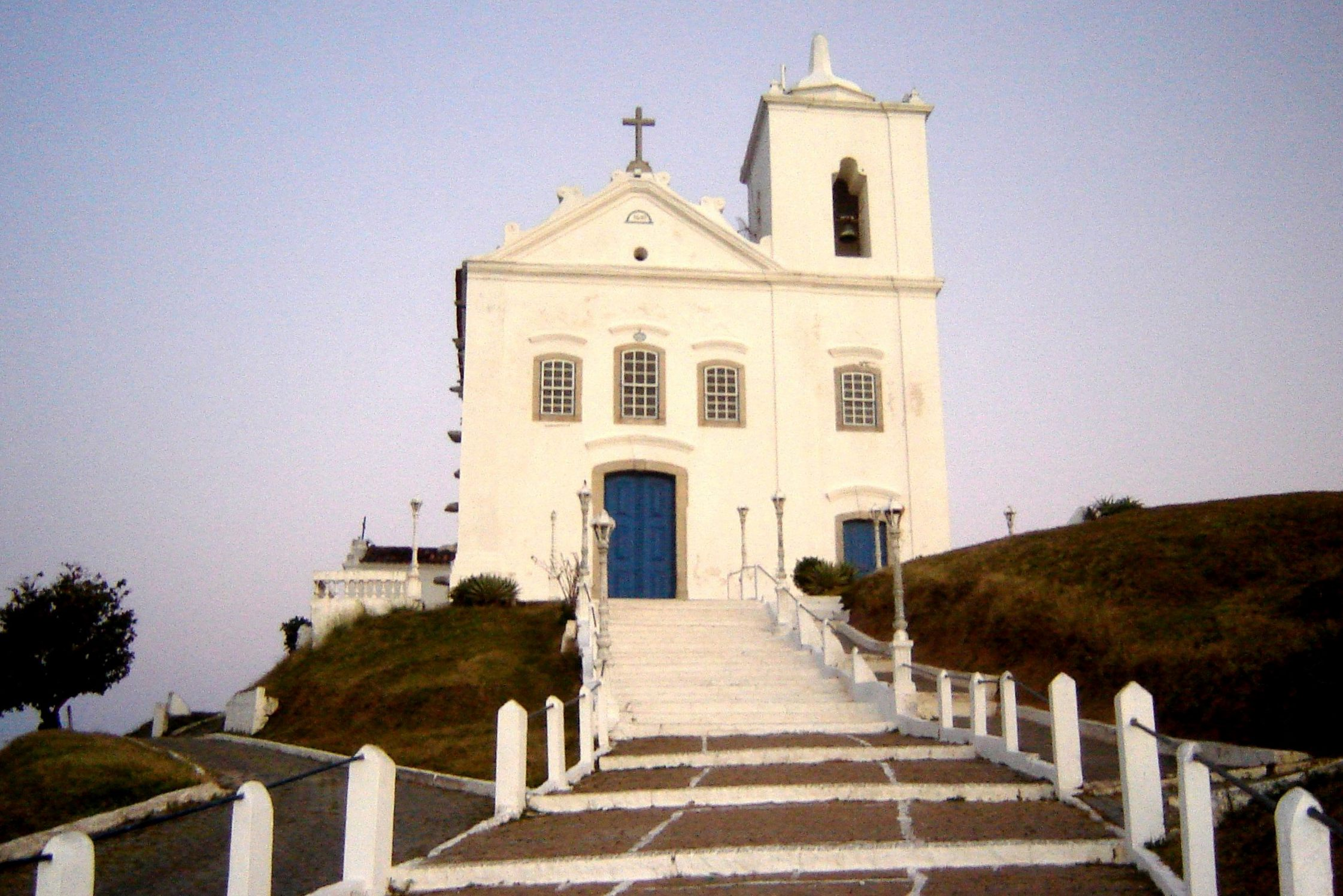 Nossa Senhora de Nazaré (Our Lady of Nazareth) church. Built in 1837, Saquarema, Rio de Janeiro, Brazil